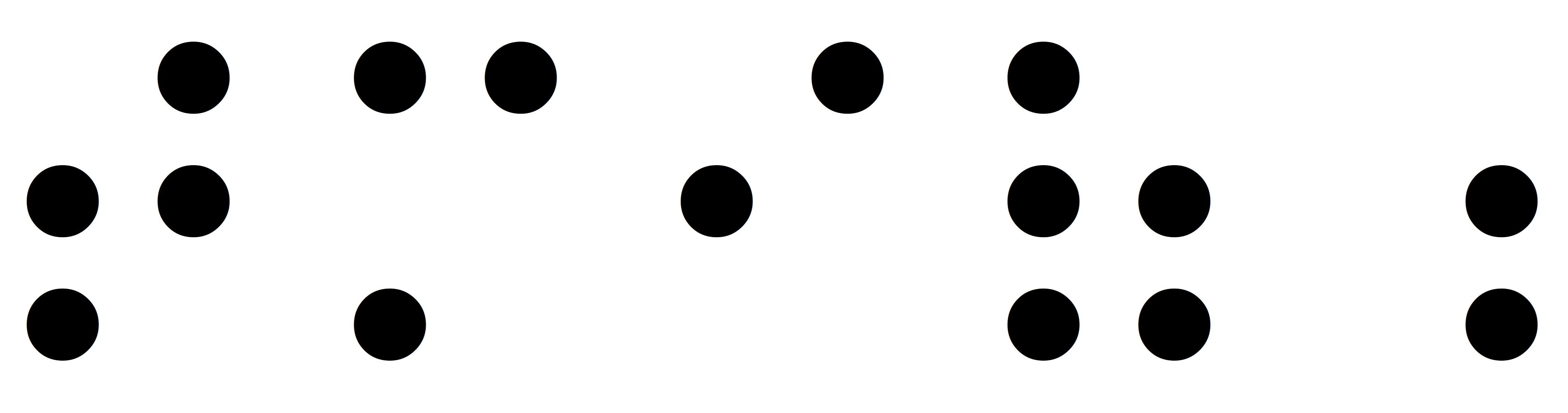 பிரெய்ல் எனப்படும் புடையெழுத்து வடிவத்தில் தமிழ் என்னும் சொல்